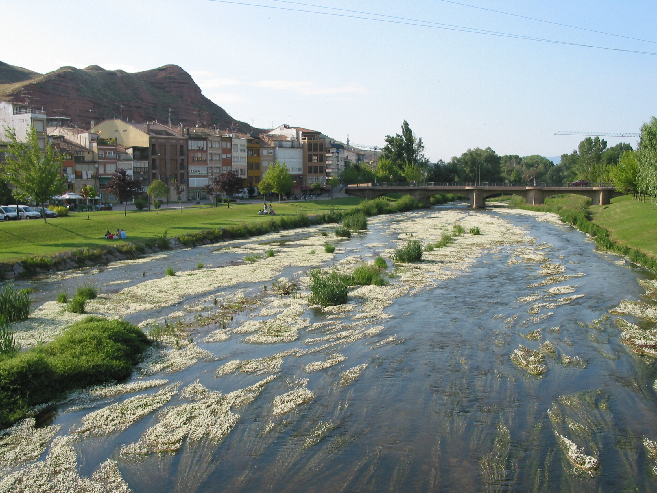 El río Najerilla a su paso por la ciudad de Nájera (La Rioja)